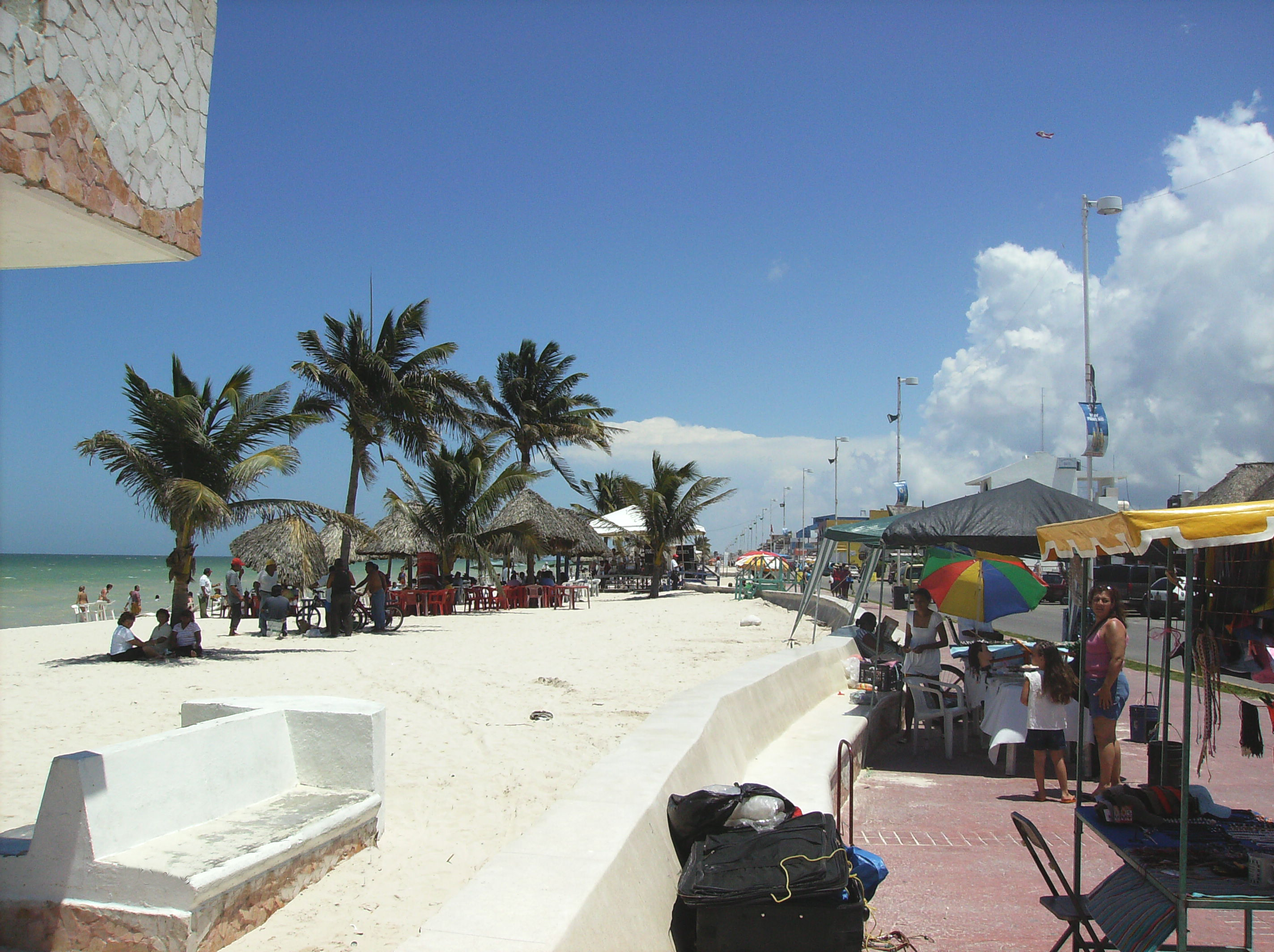 Progreso, Yucatán beach